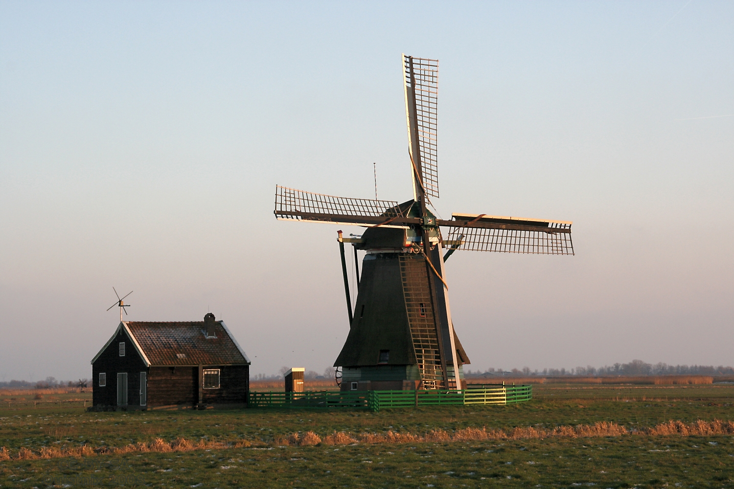 Wormer: molen De Koker / Zwarte Hengst